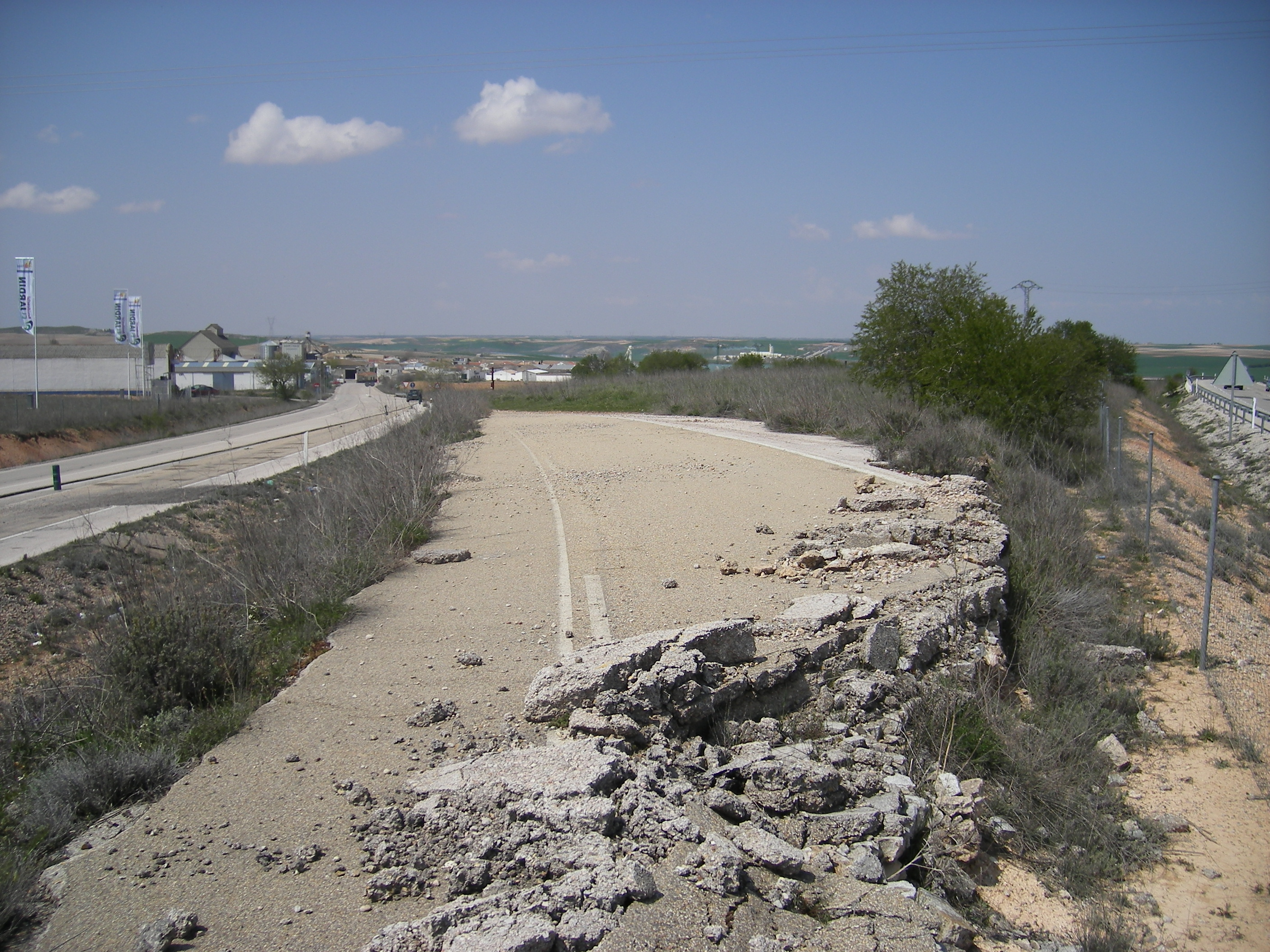 Antiguo tramo de la Carretera Nacional III donde falleció el cantante Nino Bravo. A la izquierda se puede ver la corrección de la curva realizada en la década de los 80, que en la actualidad sirve como entrada a la autovía sentido Valencia. A la derecha se puede ver la Autovía A-3 que es el desdoblamiento realizado a la N-III durante la década de los 90. Al fondo se encuentra la cruz de hierro rojo erigida a Nino Bravo muy cerca de donde se encontraba el coche siniestrado.